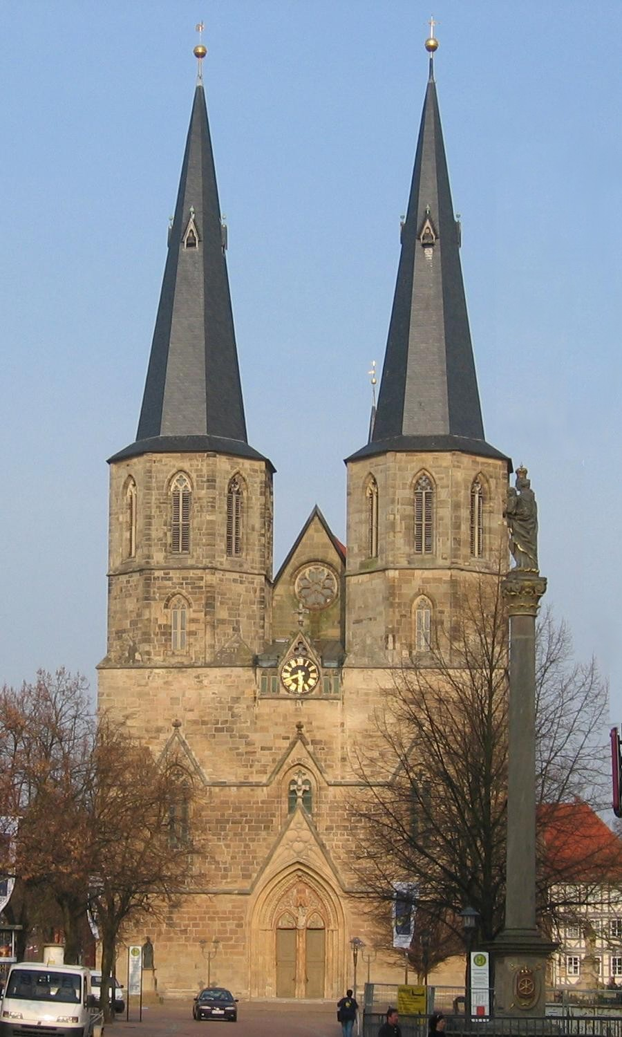 Beschreibung: Propsteikirche St. Cyriakus Duderstadt Quelle: Fotografiert am 01.04.2004 Fotograf: Christoph Wilhelms (Christoph73) Aufgenommen mit: Canon Digital IXUS 400 Copyright Status: GNU Freie Dokumentationslizenz